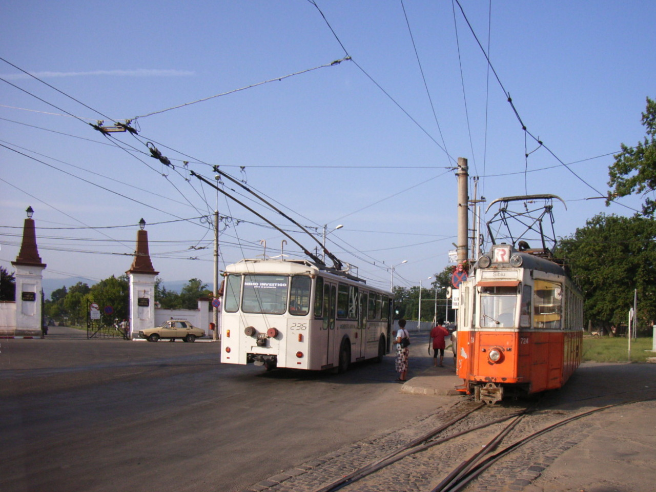 Sibiu-Hermannstadt: O-Bus und Straßenbahn an der Haltestelle beim Friedhof